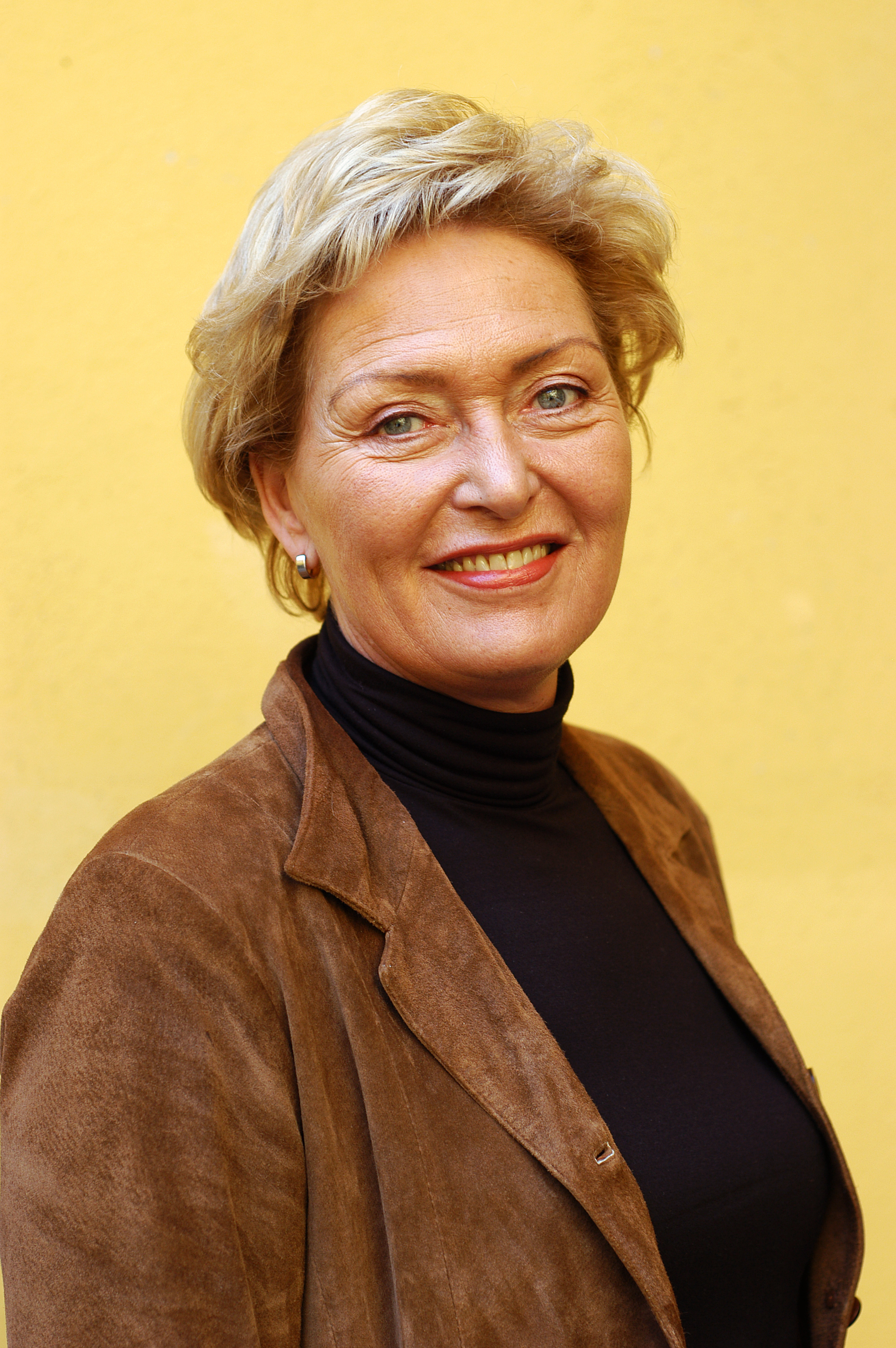 Jónína Bjartmarz, Nordiska rådets vicepresident